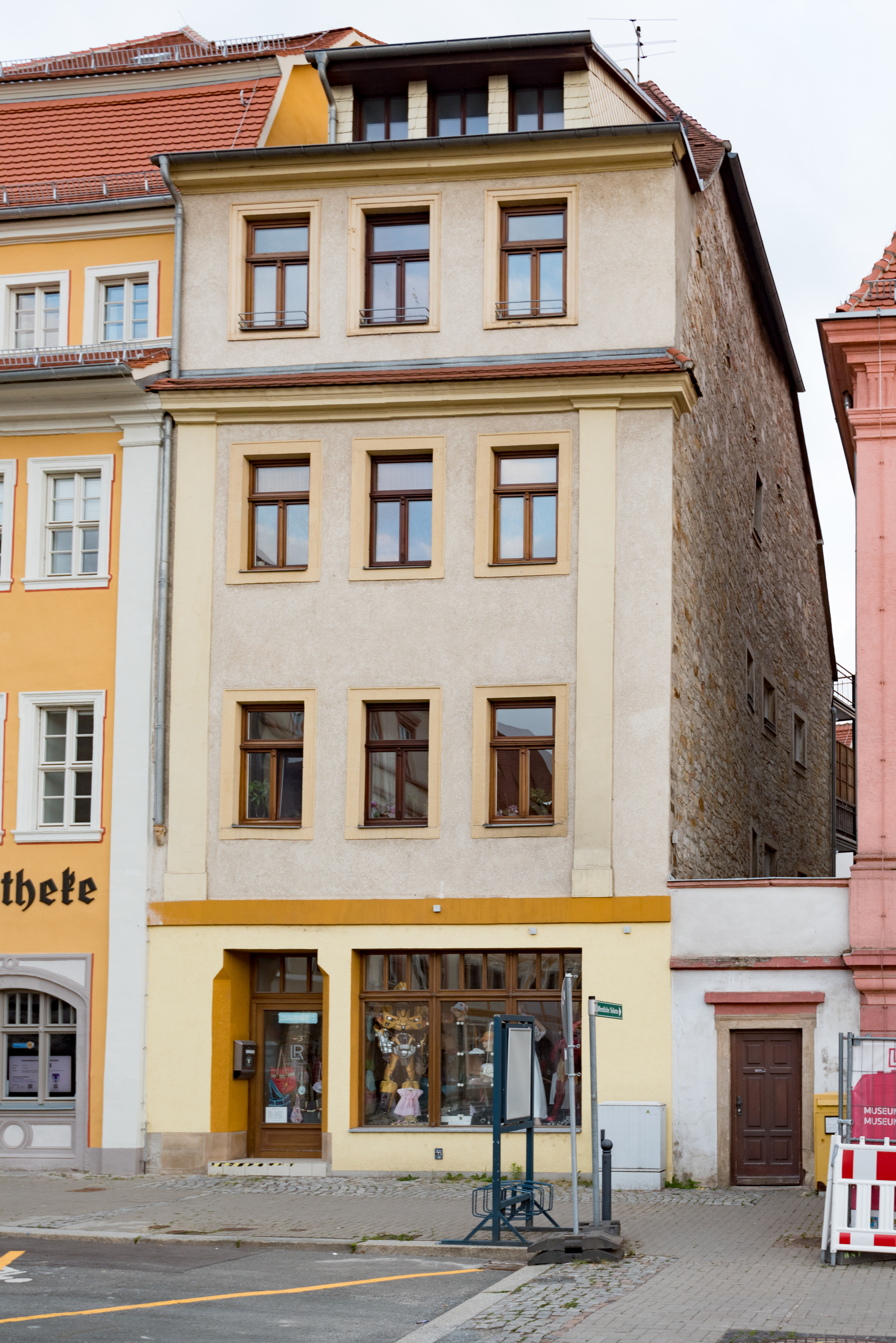 Weißenfels, Markt 2